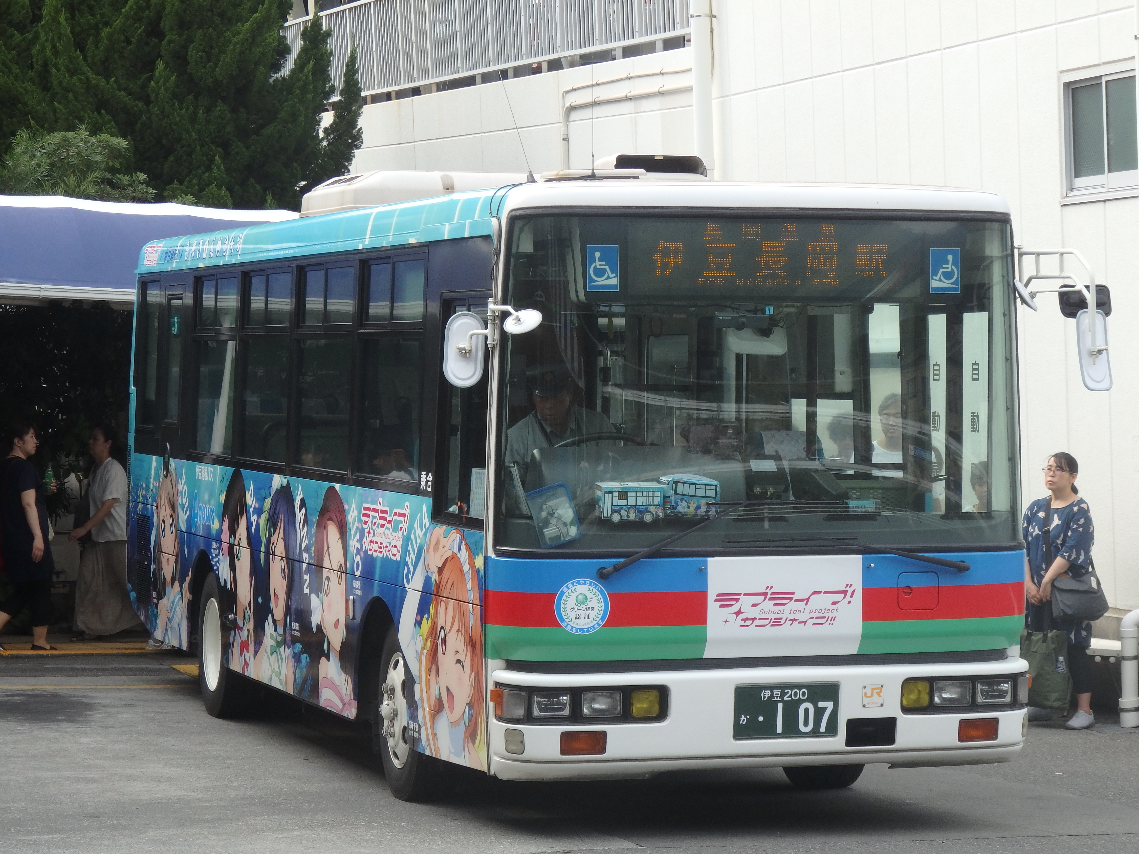 伊豆箱根バス三島営業所所属伊豆200か・107号車